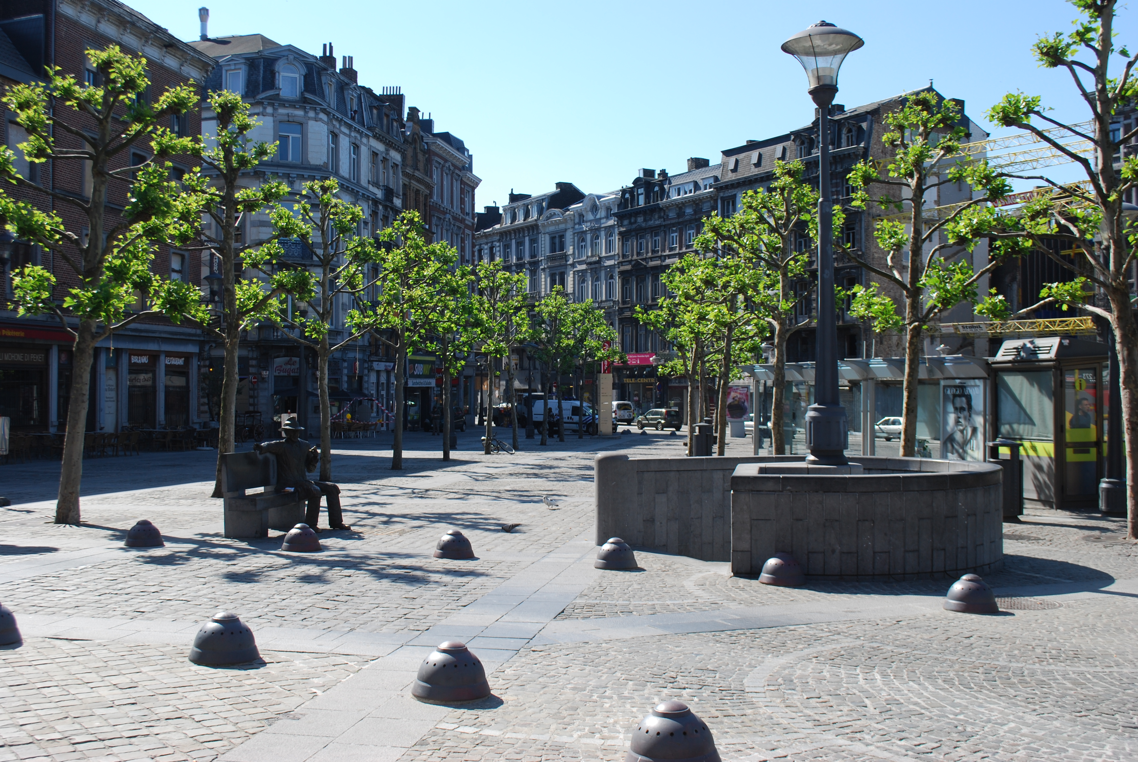 Vue vers la rue Léopold à Liège.